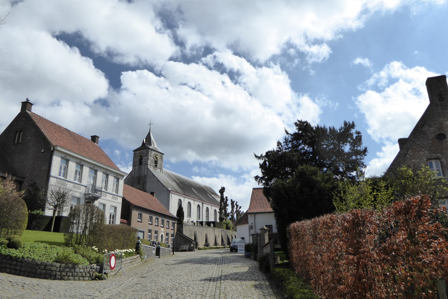 Kluisbergen Dorpskern Kwaremont Ommegangstraat